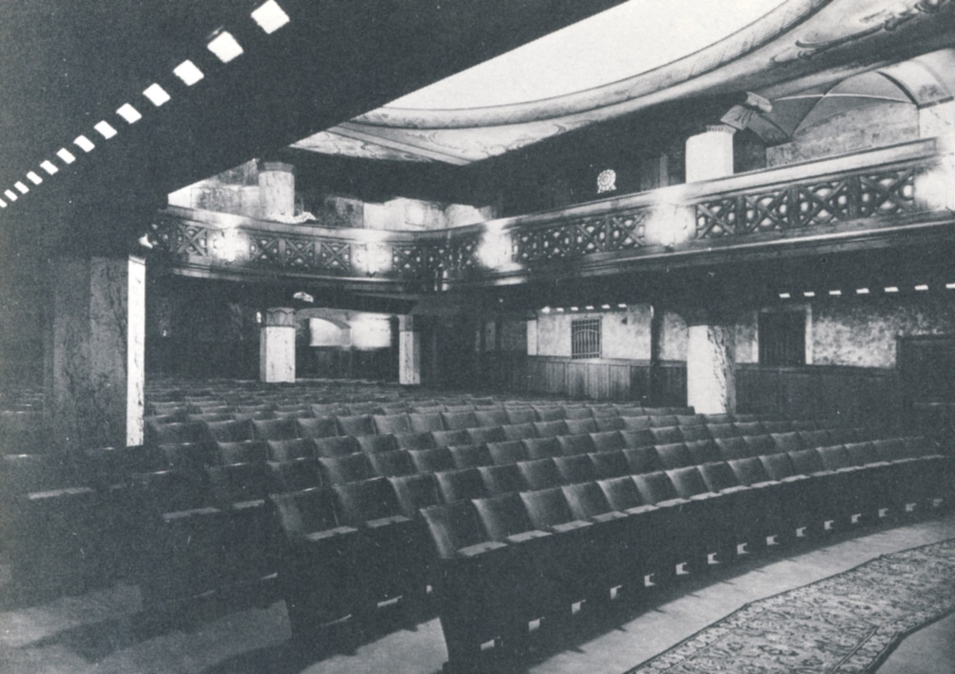 Biografen "Rialto" i Stockholm, salongen